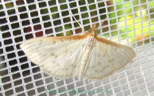 Hodebertia testalis